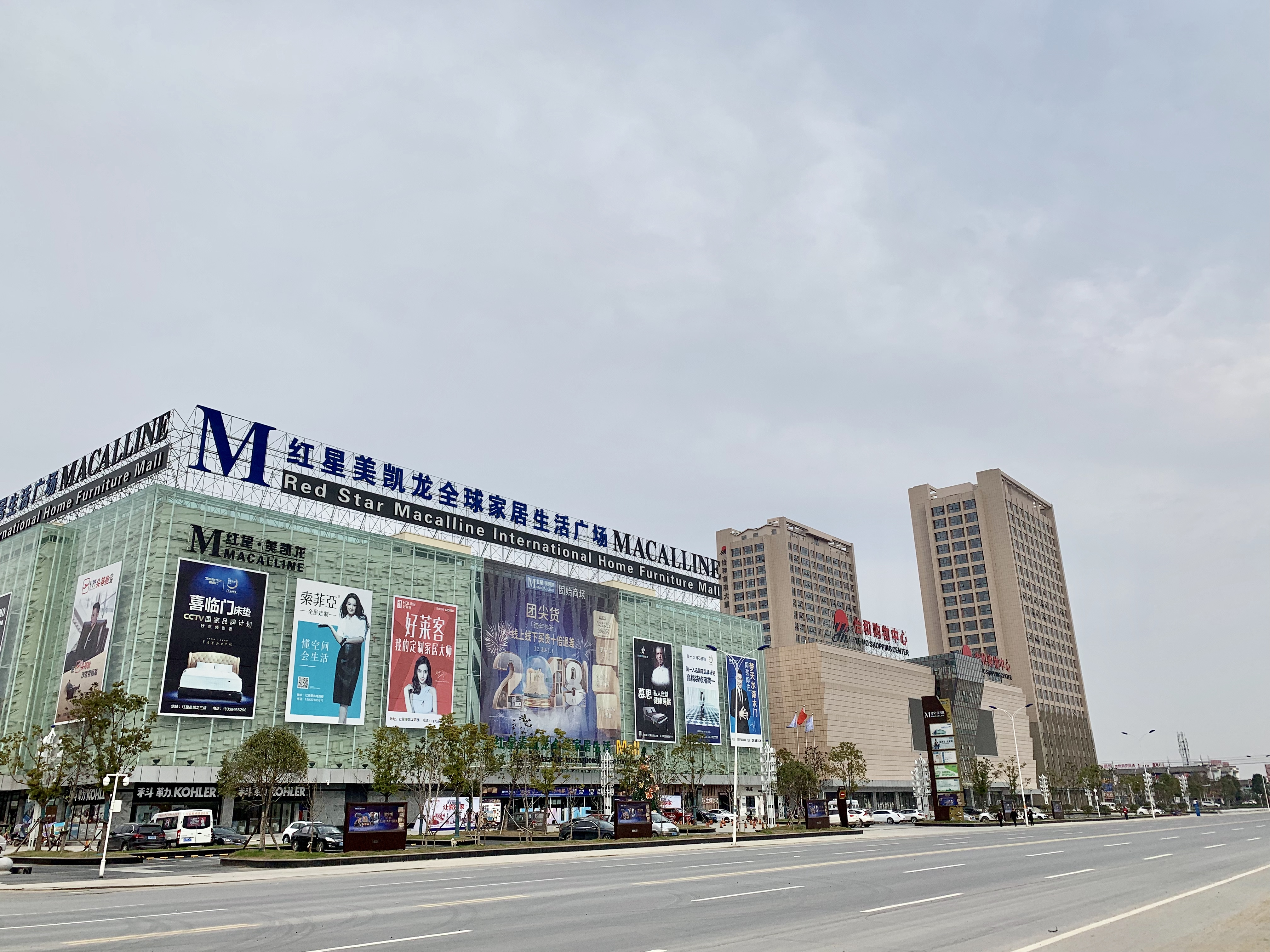 固始县城怡和新城怡和大道沿街景观，图中显示了怡和大道、红星美凯龙家居市场和怡和首府大厦。